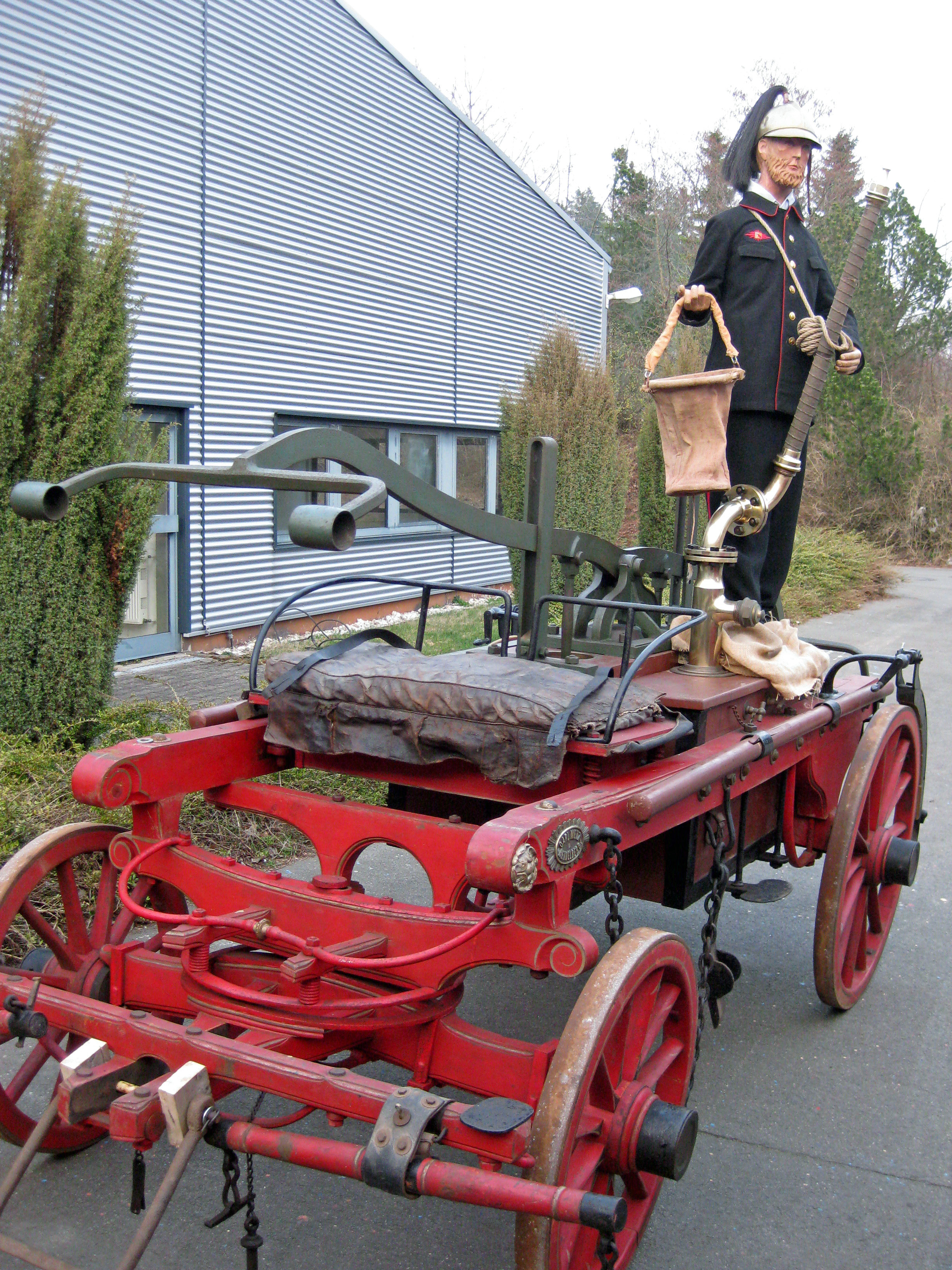 Landspritze der Feuerwehr Rinzenberg. Steht im Rheinland-Pfälzischen Feuerwehrmuseum Hermeskeil. Interessant ist das Wenderohr, mit welchem vor Erfindung des Schlauches das Wasser Richtung Brandobjekt gespritzt wurde.